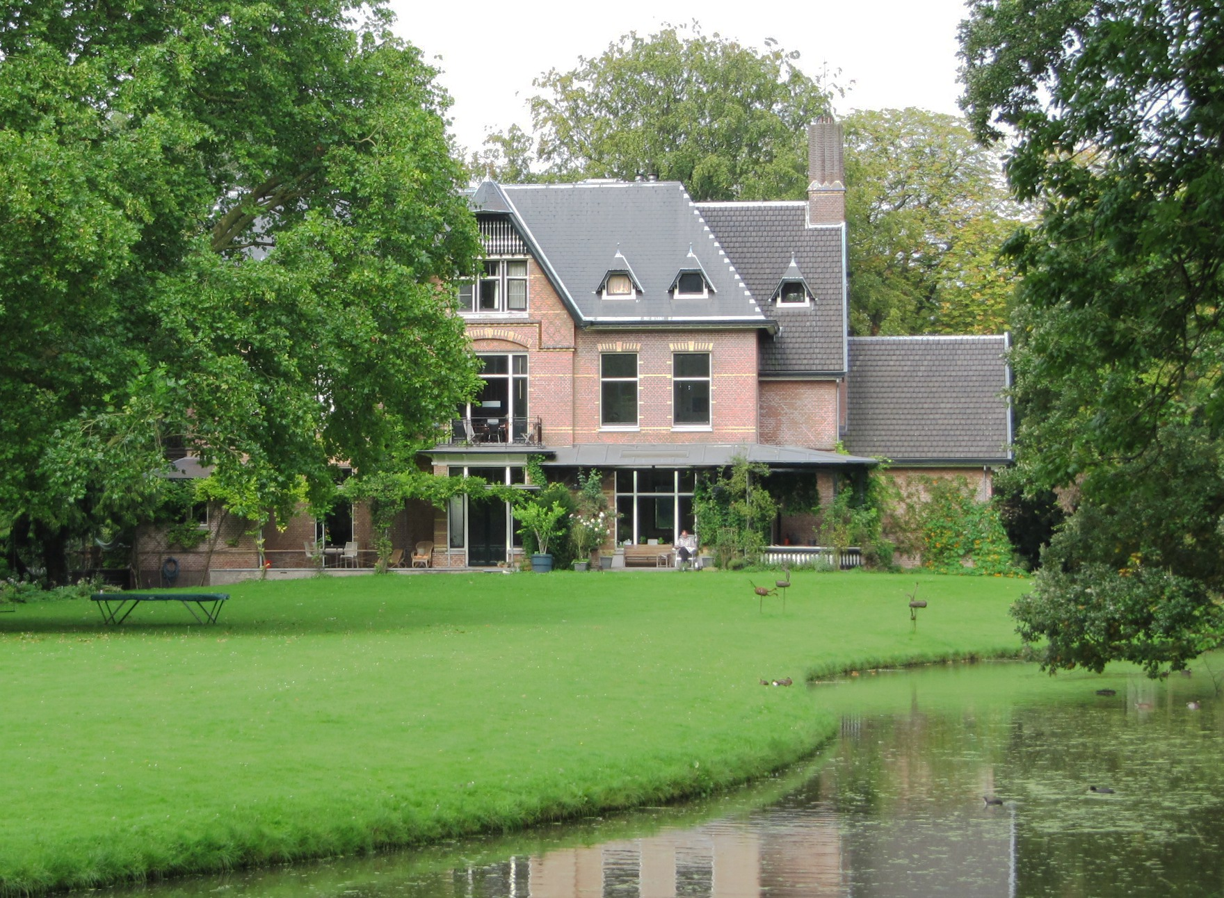 RM497174 Dordwijk - villa Sorghvliet.jpg